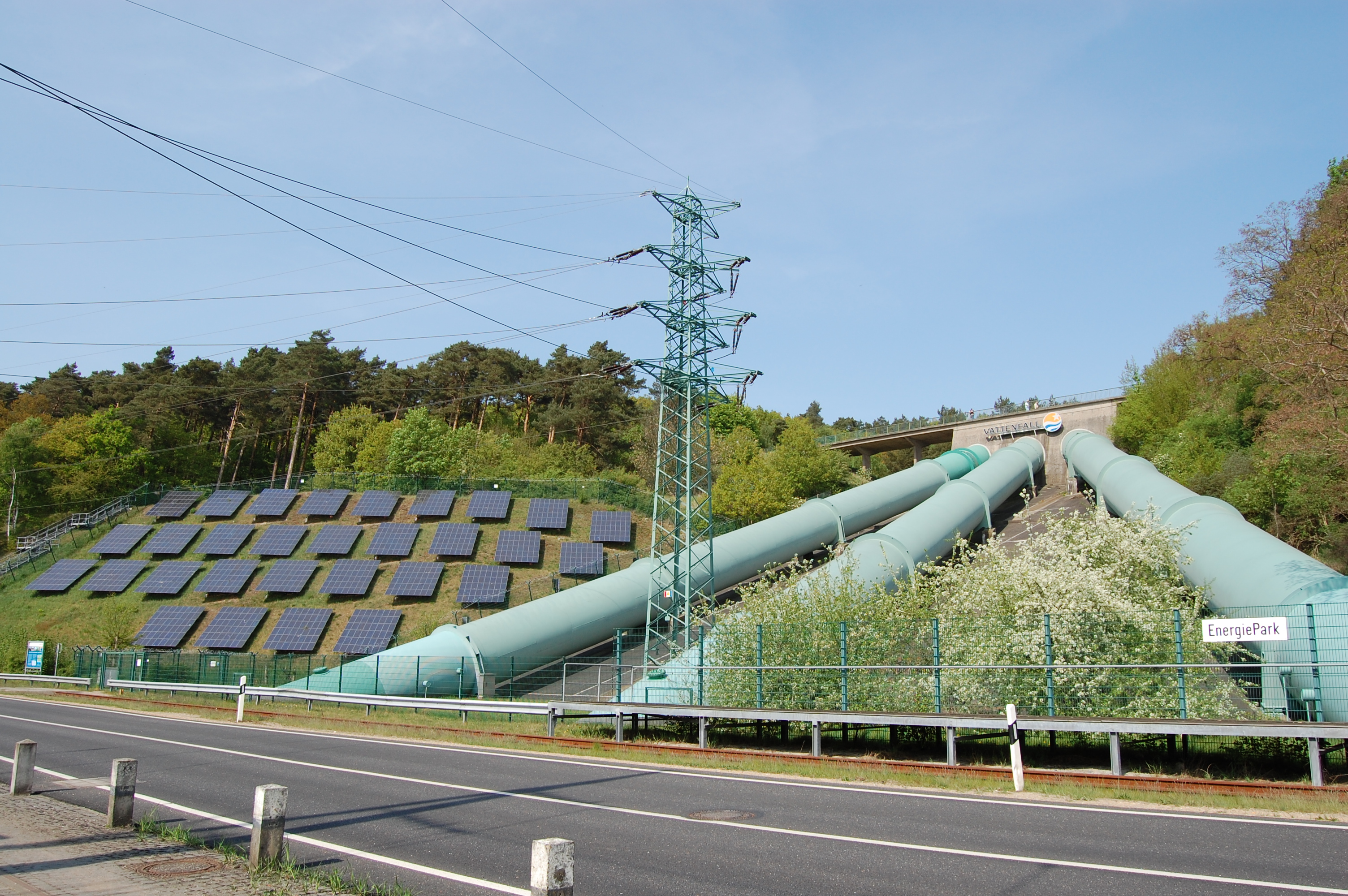 Das Pumpspeicherkraftwerk Geesthacht und links ein Solarpark mit einer Leistung von 60 kWp. Der Energiepark ist an der B5 in Geesthacht gelegen.